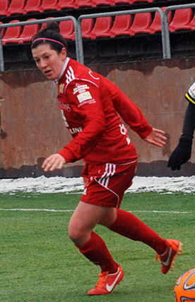 Katie Kelly